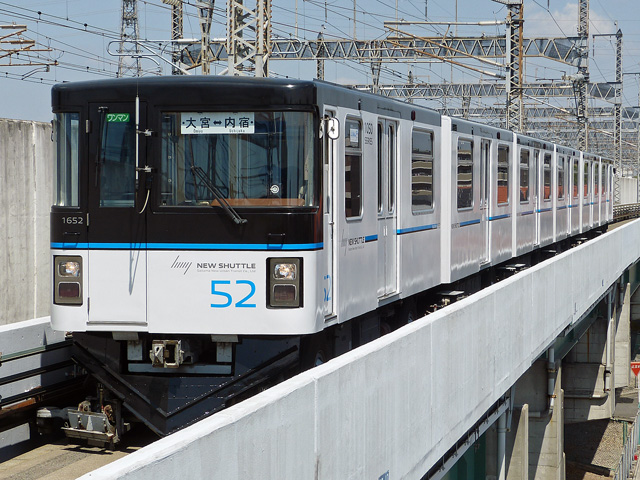 埼玉新都市交通1050系新塗装車。加茂宮駅にて。2019年4月18日撮影。 Panasonic Lumix DMC-FZ150